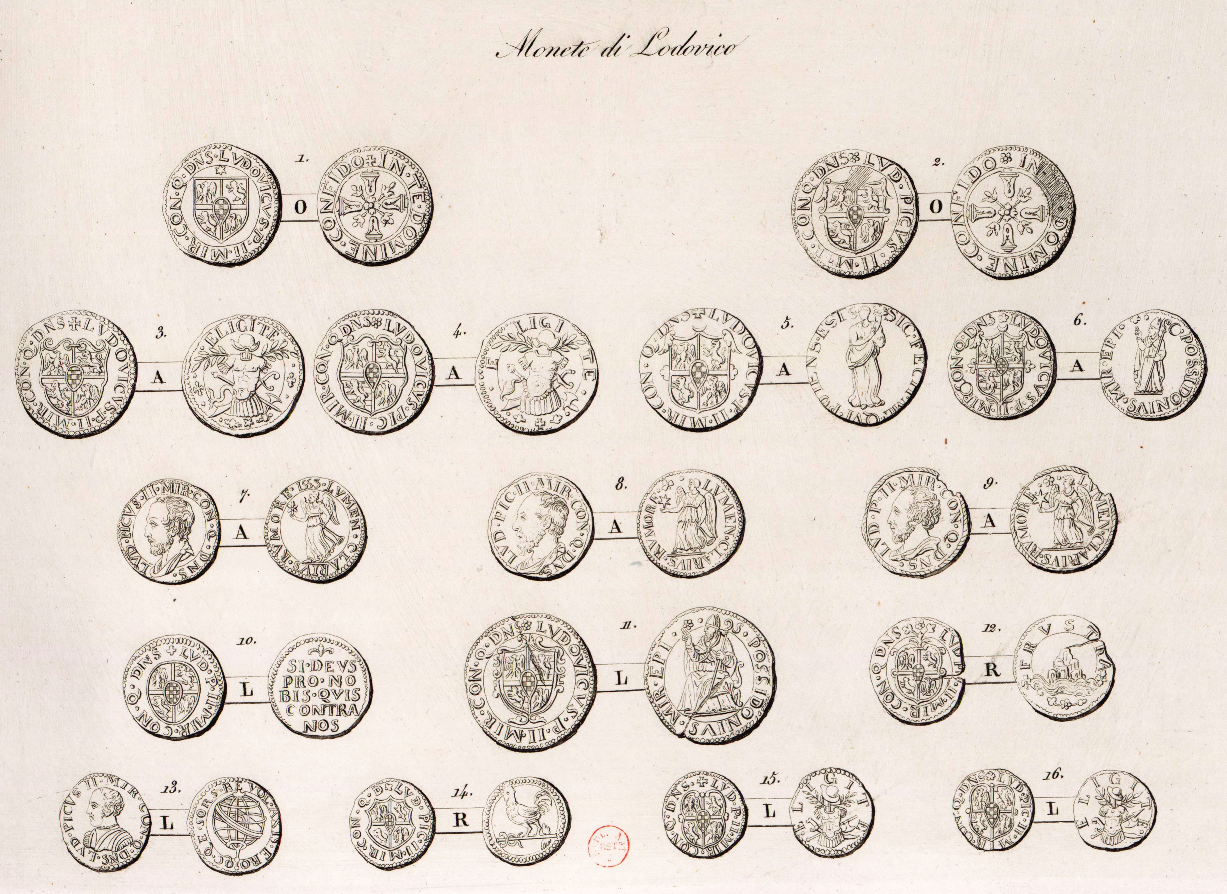 Monete di Lodovico Pico